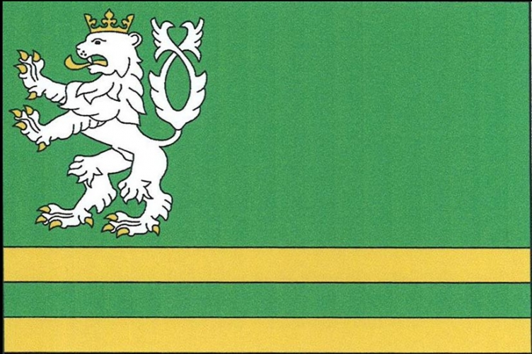 vlajka, Kohoutov, okres Trutnov